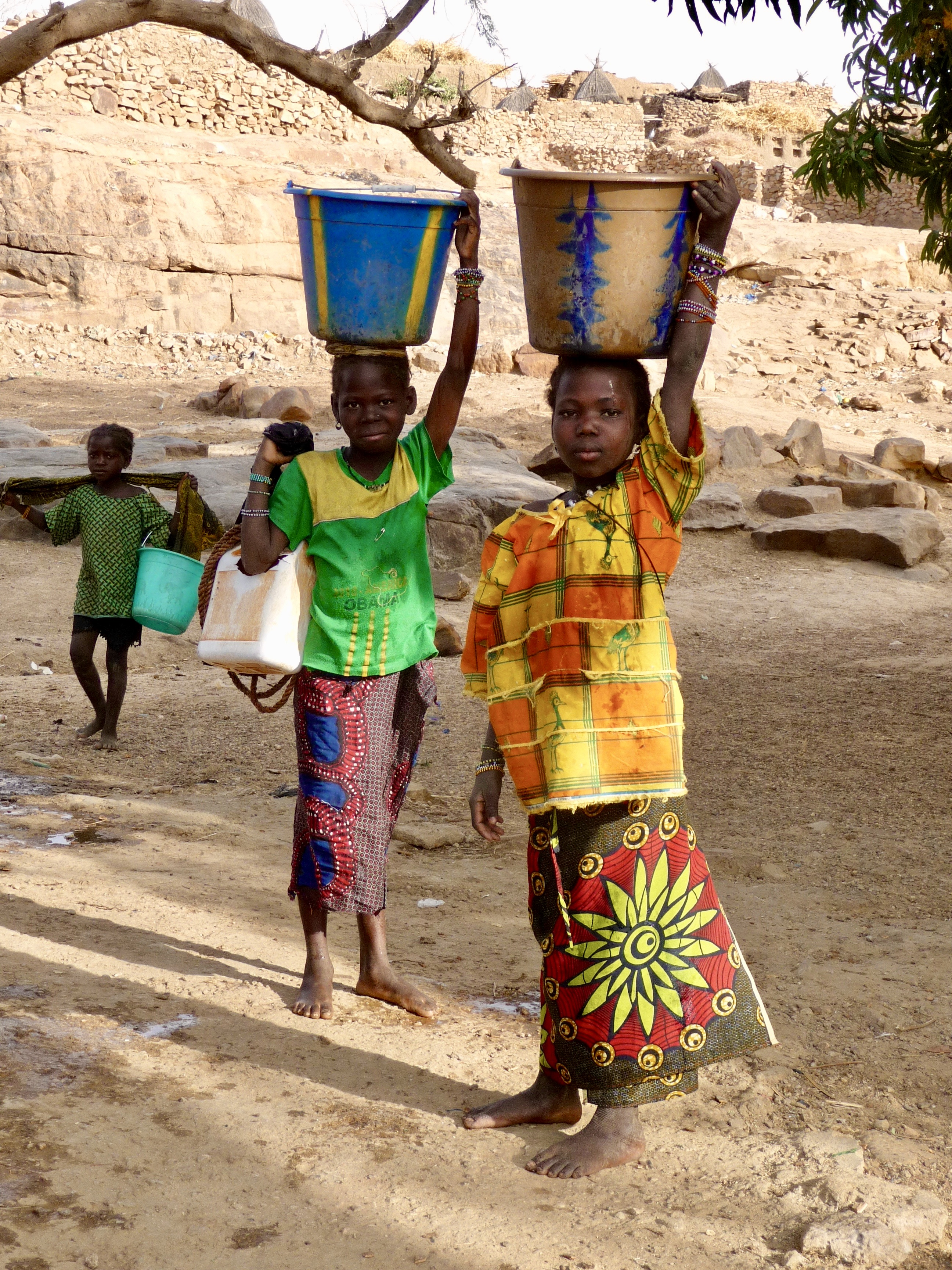 Les petites filles d'une douzaine d'années portaient sur leur tête des seaux de 20 litres ! Cette scène se déroule à Dourou sur le plateau du Pays Dogon. This is an image with the theme "Africa on the Move or Transport" from: Mali